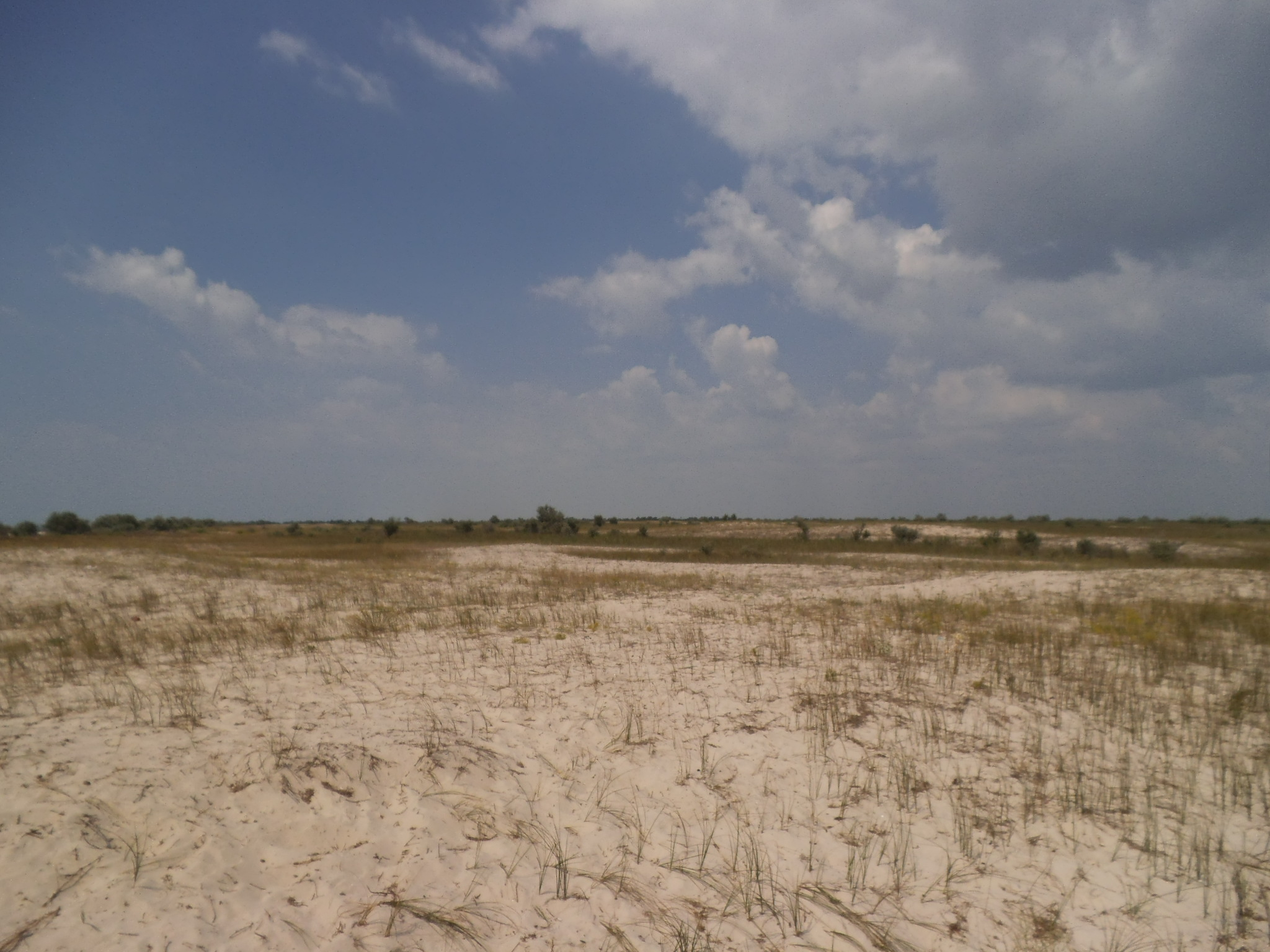 Острів Джарилгач влітку 2013 року. Краєвиди